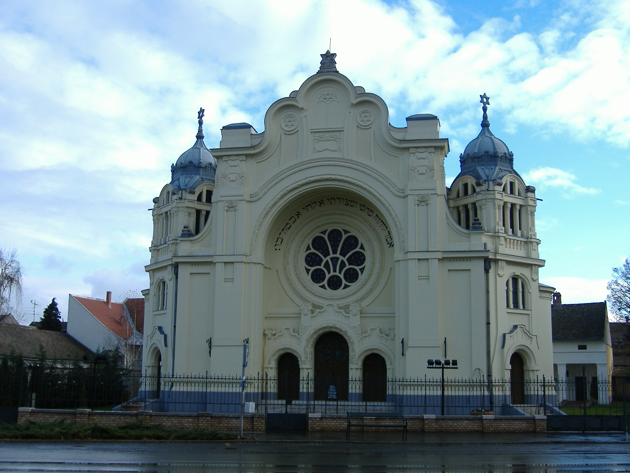 Hódmezővásárhely zsinagóga. Volt iskola, romantikus-szecessziós, épült 1852-1857 között. Tervezte Busch Miklós szentesi építész. 1906-ban Müller Miksa tervei szerint építették át. - Csongrád m., Hódmezővásárhely, Szeremlei u. 3. This is a photo of a monument in Hungary, Identifier: 3388